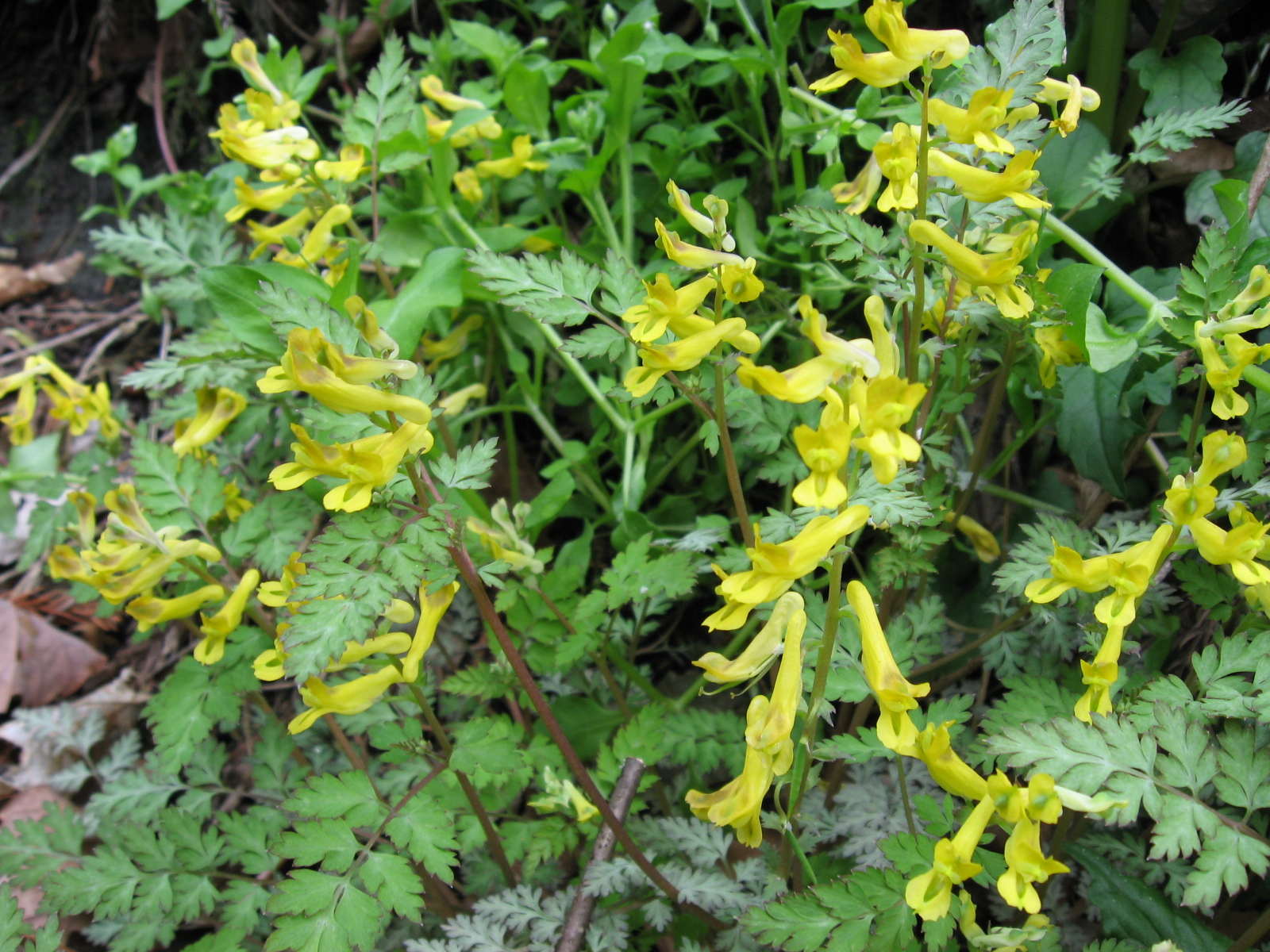 ミヤマキケマン (学名:Corydalis pallida var. tenuis) 撮影地：東京都八王子市